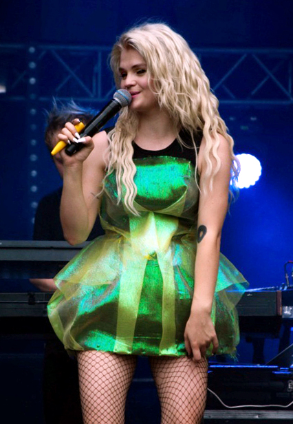 Margaret (Małgorzata Jamroży) na Grupa Azoty Grand Festival 2014 w Tarnowie.